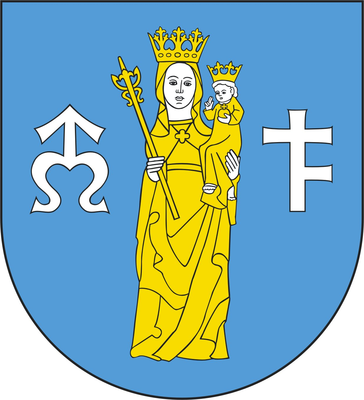 Herb gminy Nowy Targ